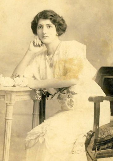 Dama Hispano-cubana de principios del siglo XX.